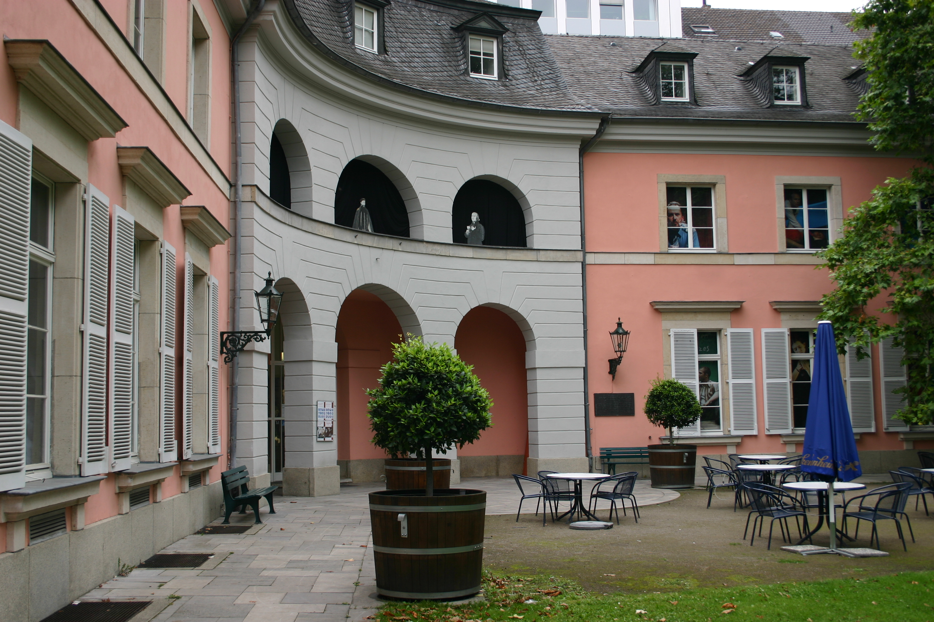 Hofgärtnerhaus im Hofgarten Düsseldorf / Nordrhein-Westfalen]